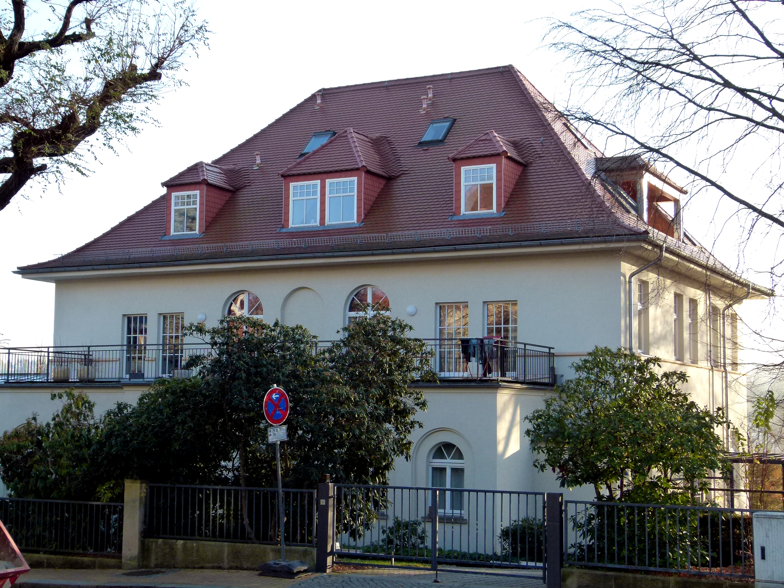 Dresden-Loschwitz. Denkmalgeschützte Paulus-Villa, Preußstraße 10.